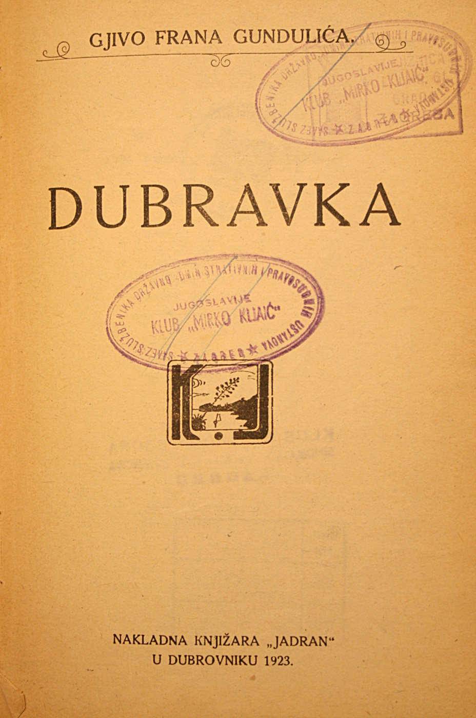 Dubravka, Ivan Gundulić